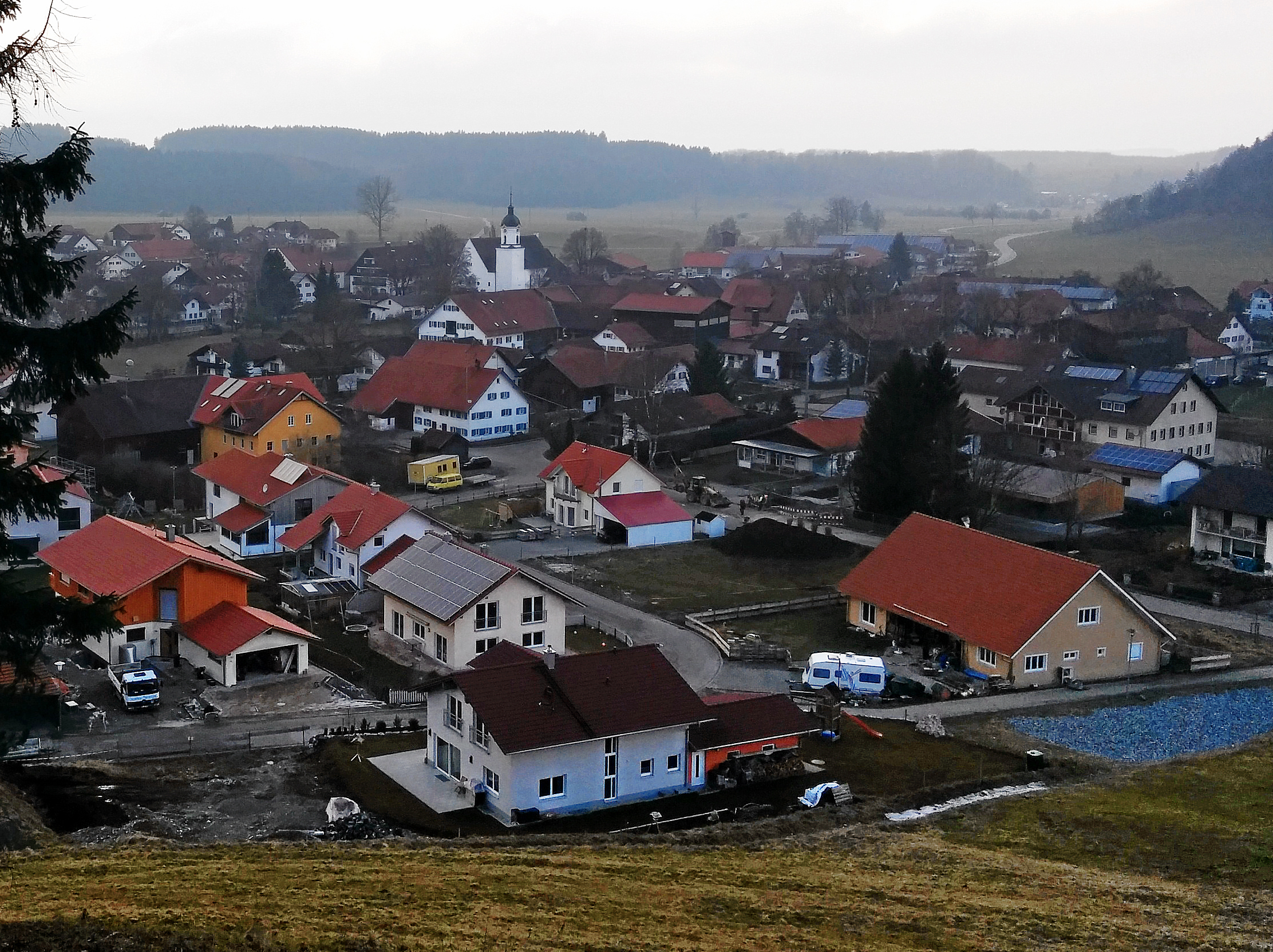 Friesenried, Ansicht vom Wasserhochbehälter an der Riedkapelle